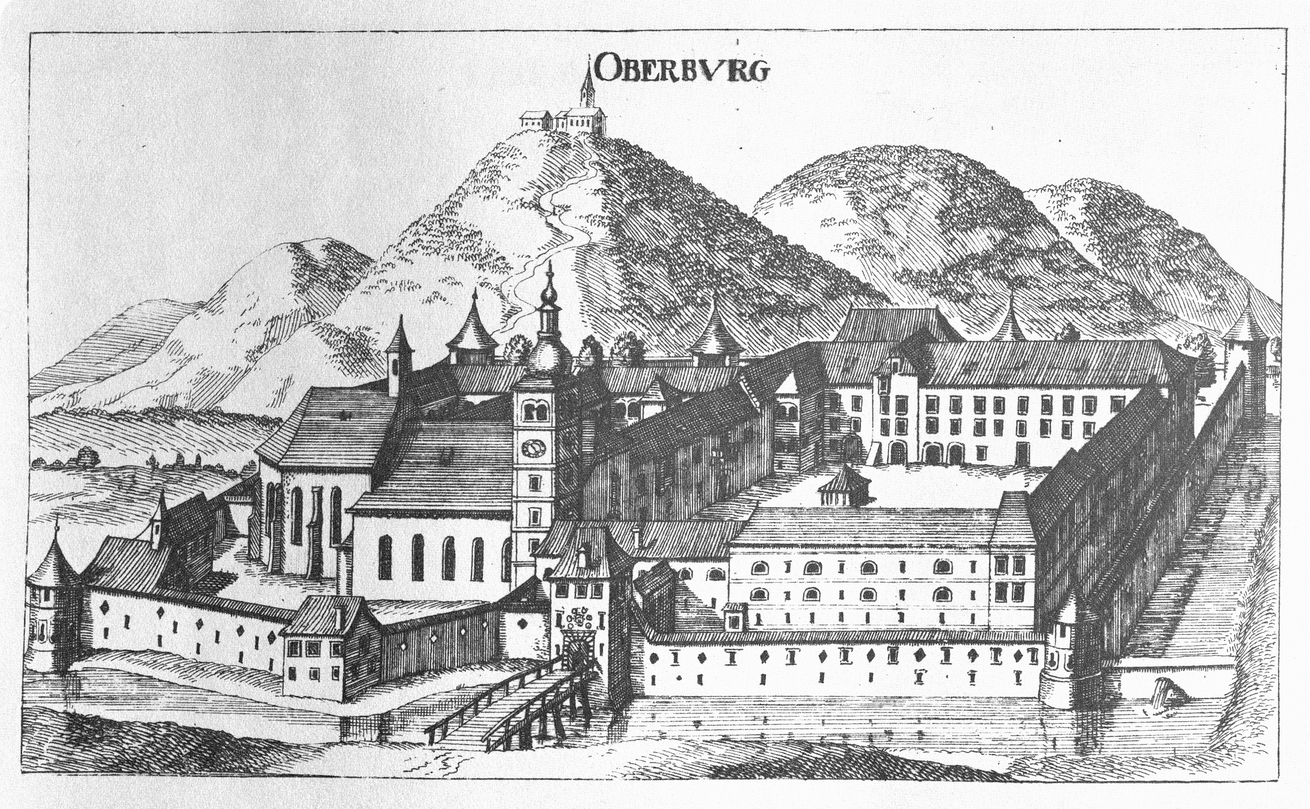 G. M. Vischers Käyserlichen Geographi, Topographia Ducatus Stiriae, Das ist: Eigentliche Delineation / und Abbildung aller Städte / Schlösser / Marcktfleck / Lustgärten / Probsteyen / Stiffter / Clöster und Kirchen / so es sich im Herzogthumb Steyrmarck befinden; Und anjetzo Umb einen billichen Preyß zu finden seynd Bey Johann Bitsch Universitäts Buchhandlern / Auff dem Juden=Platz bey der guldenen Saulen. Graz 1681 Die Nummerierung der Dateien folgt der alphabetischen Reihung der Ortsnamen und entspricht nicht dem Vischer-Register